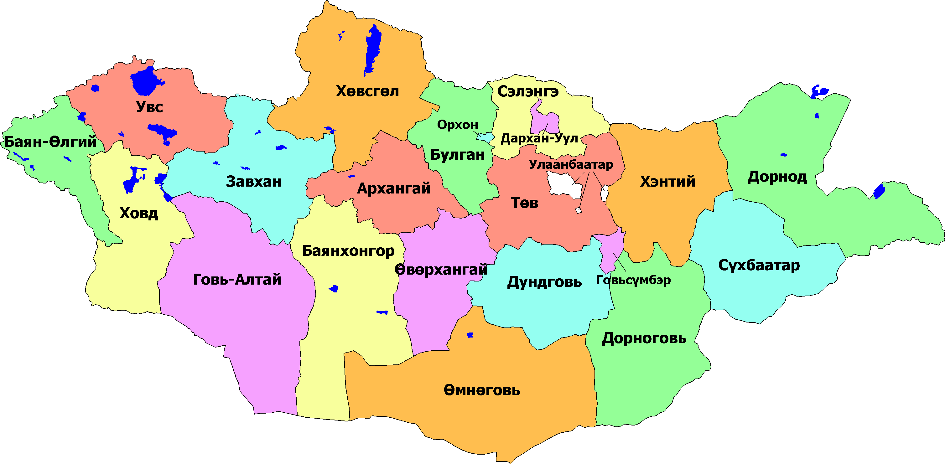 Аймгуудын газрын зураг